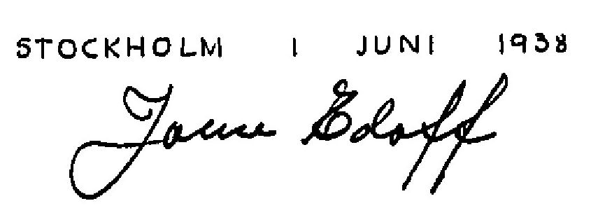 Villa Rosenlund, trädgårdsmästarbostaden, arkitektens namnteckning